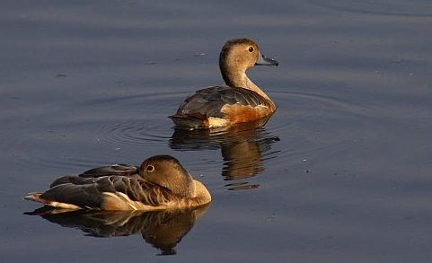 Lesser Whistling Duck